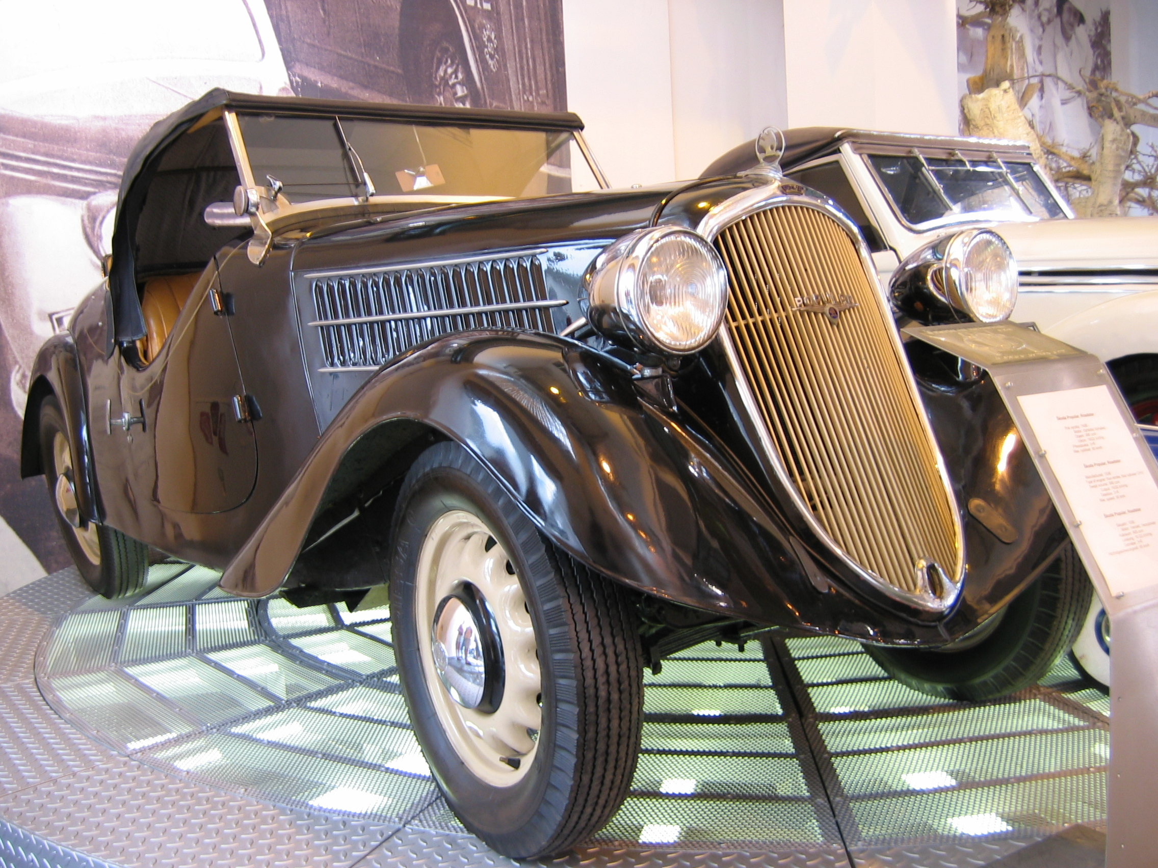 1934 Škoda Popular - Škoda Auto Museum, Mlada Boleslav